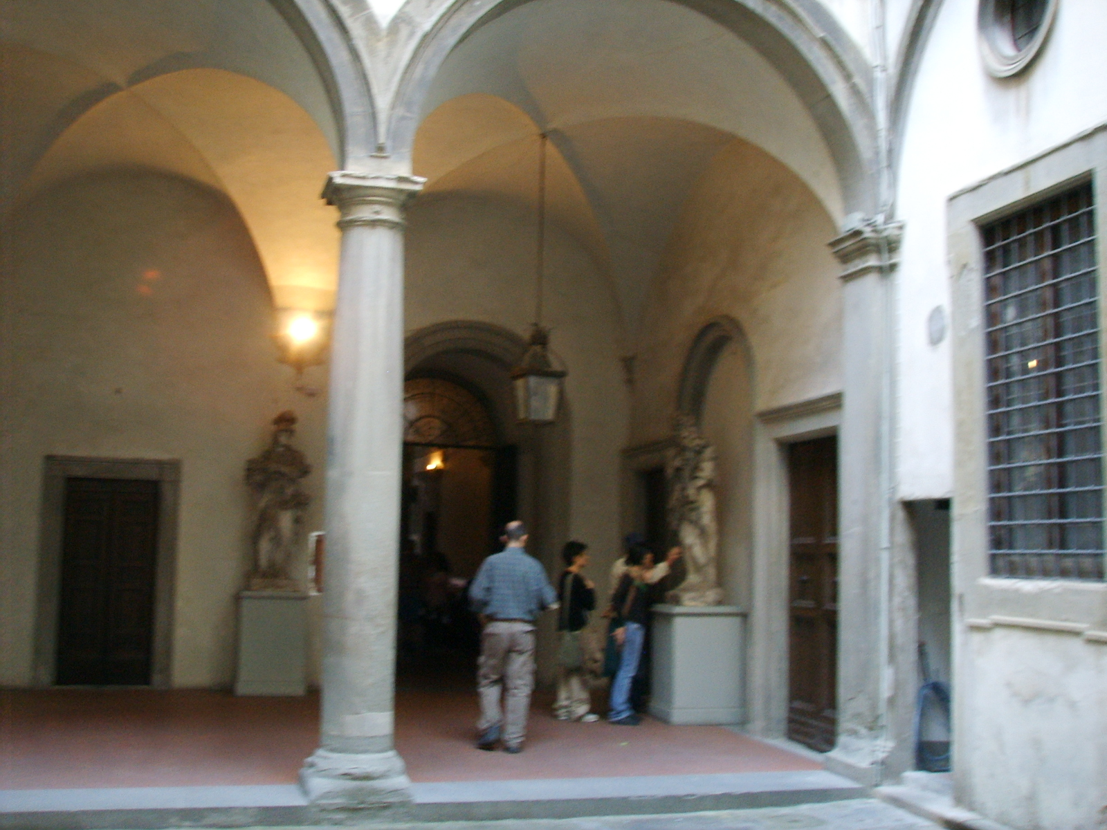 Palazzo michelozzi cortile